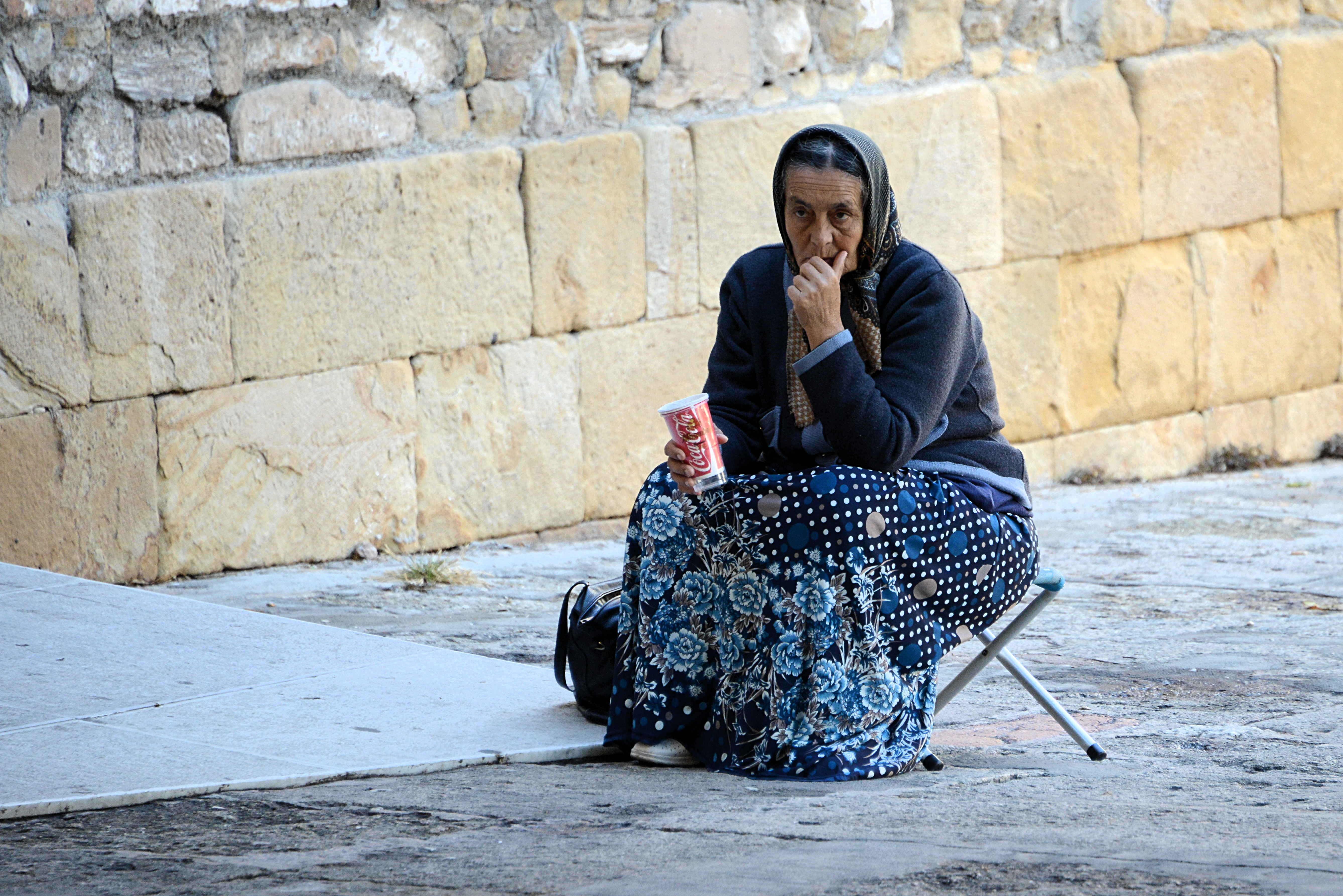 Mendiga, Málaga.